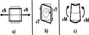 Regula semnelor pentru eforturi